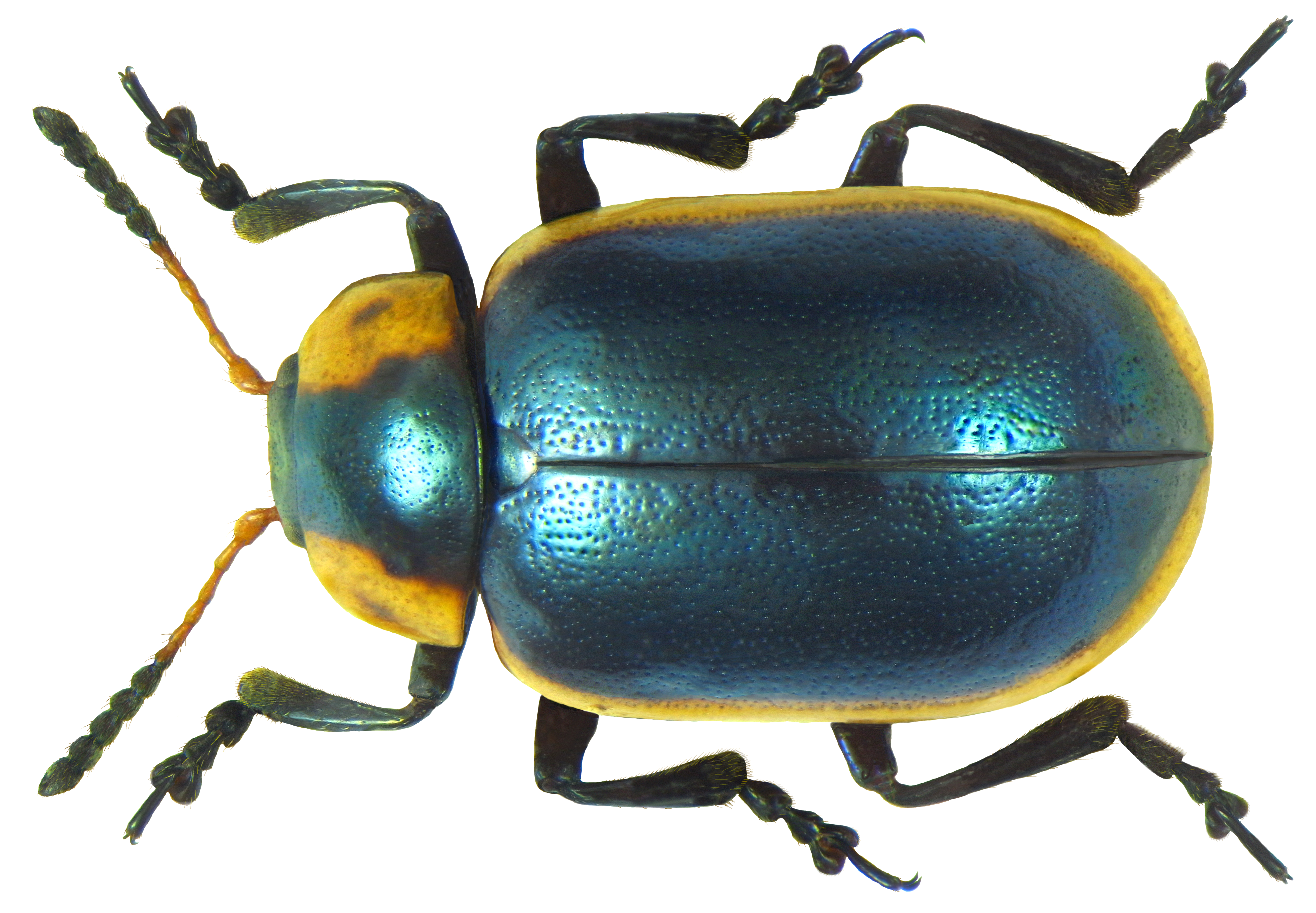 Familie: Chrysomelidae Groesse: 6,6 mm Fundort: Senegal, Casamance, Cape Skirring leg. U.Schmidt, 11.XI.1990; det. M.Daccordi, 2012 Photo: U.Schmidt, 2012